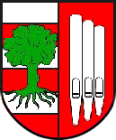 Wappen von Ponitz, Thüringen